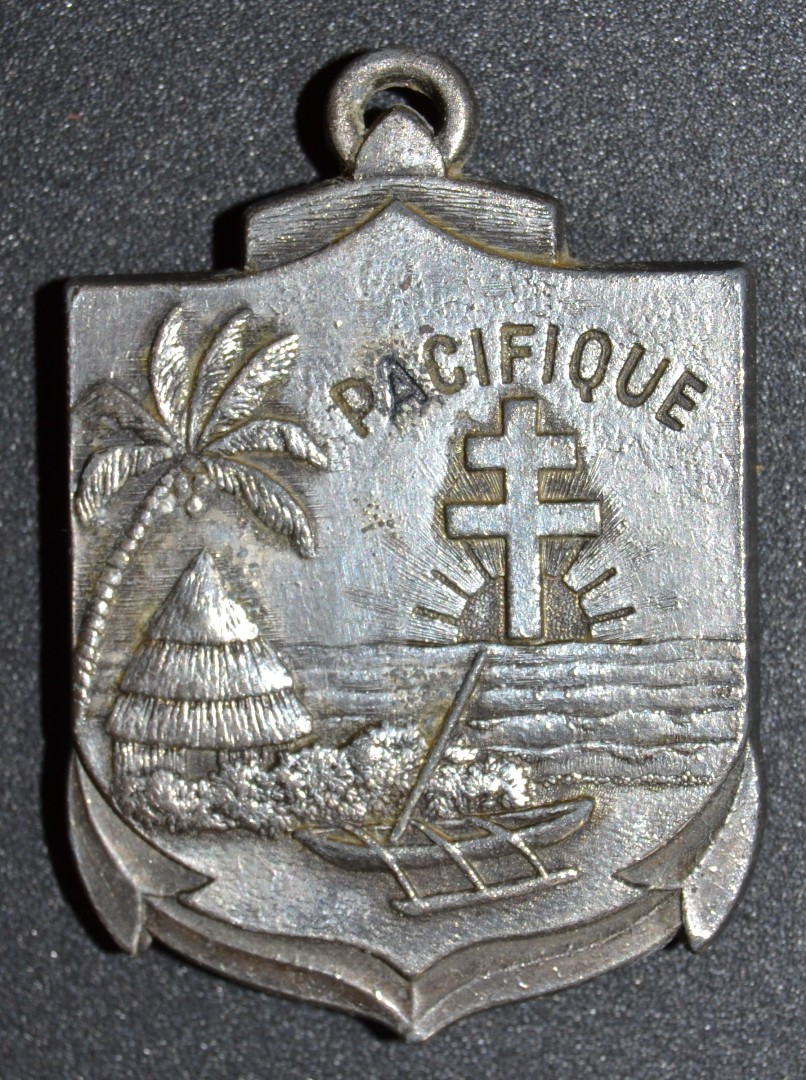 Insigne du Régiment d'Infanterie de Marine du Pacifique Nouvelle Calédonie